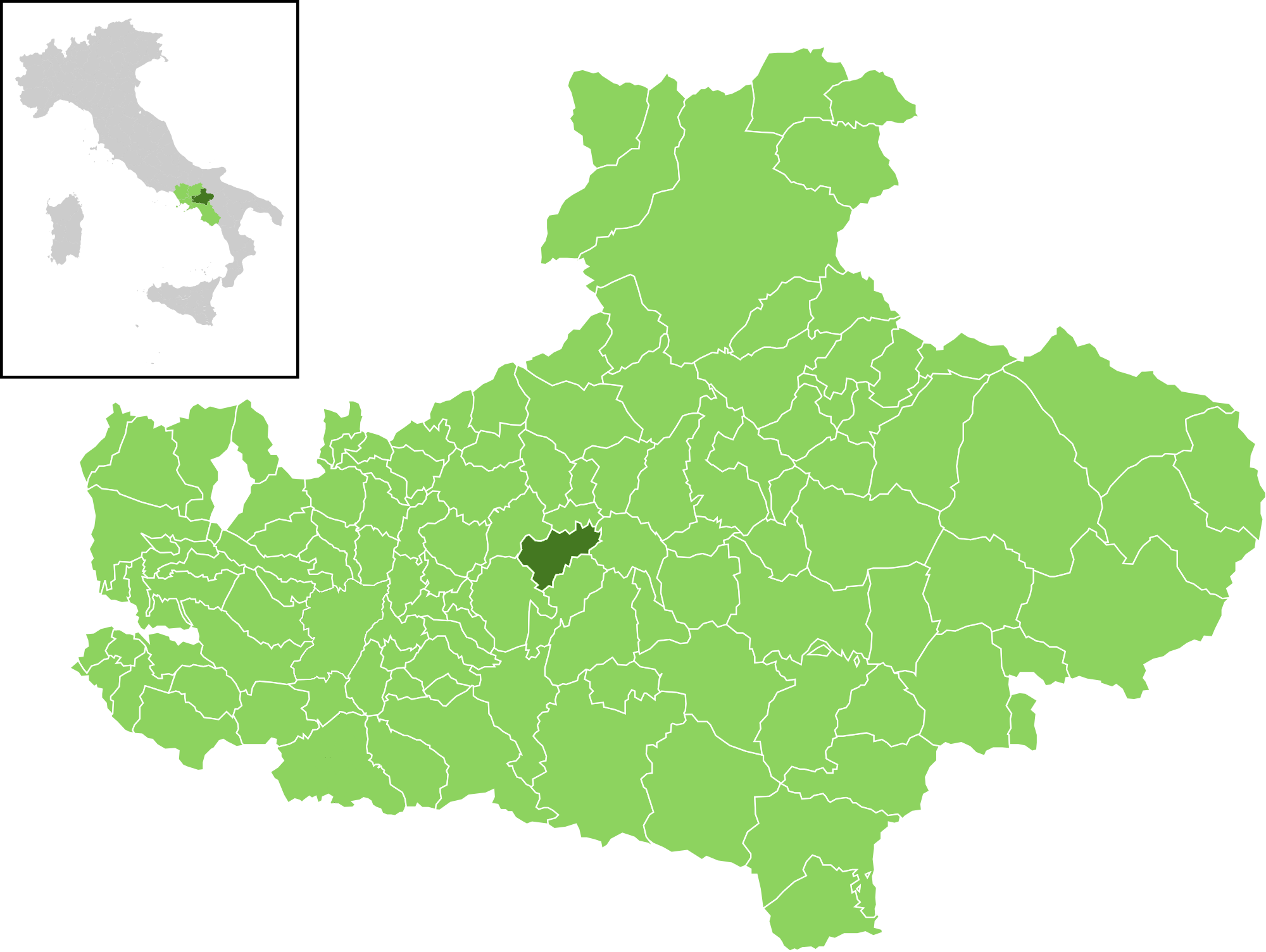 Posizione del comune all'interno della provincia di Avellino